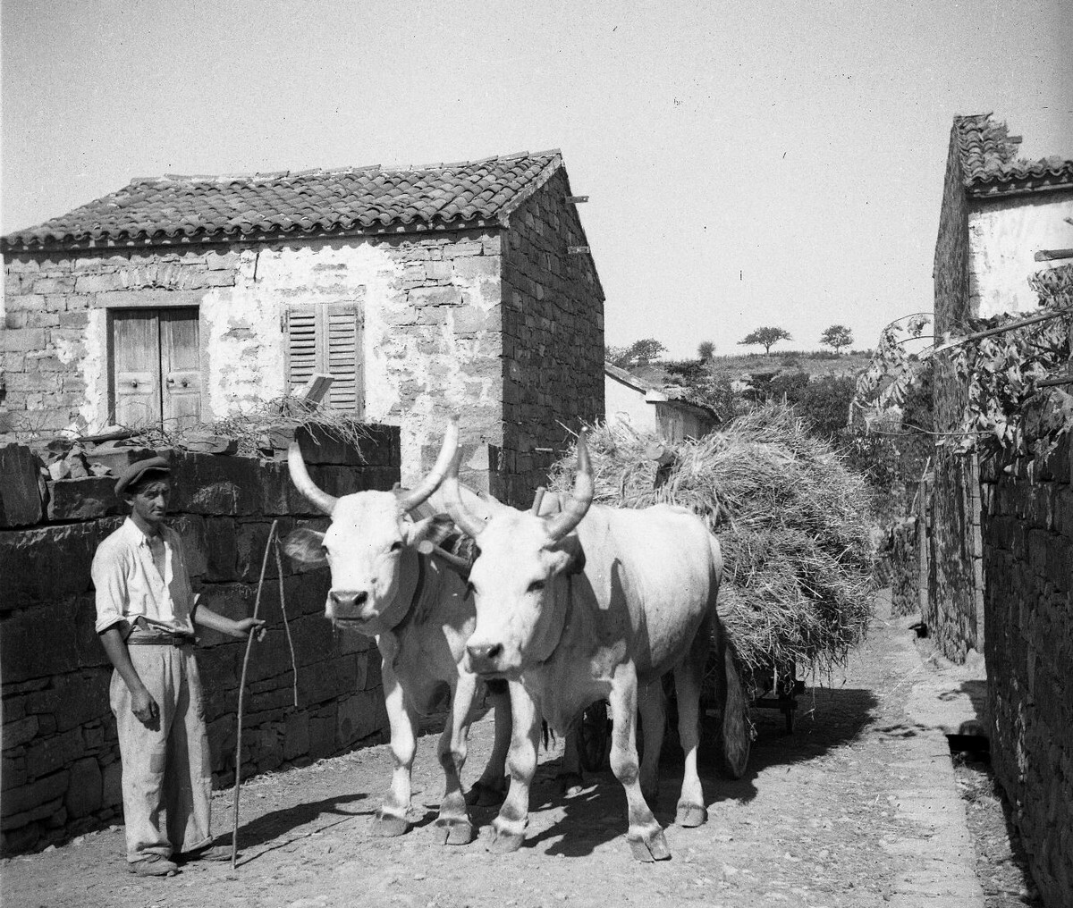 Franc Benčič vozi domov ječmen s parom volov (Pomjan).